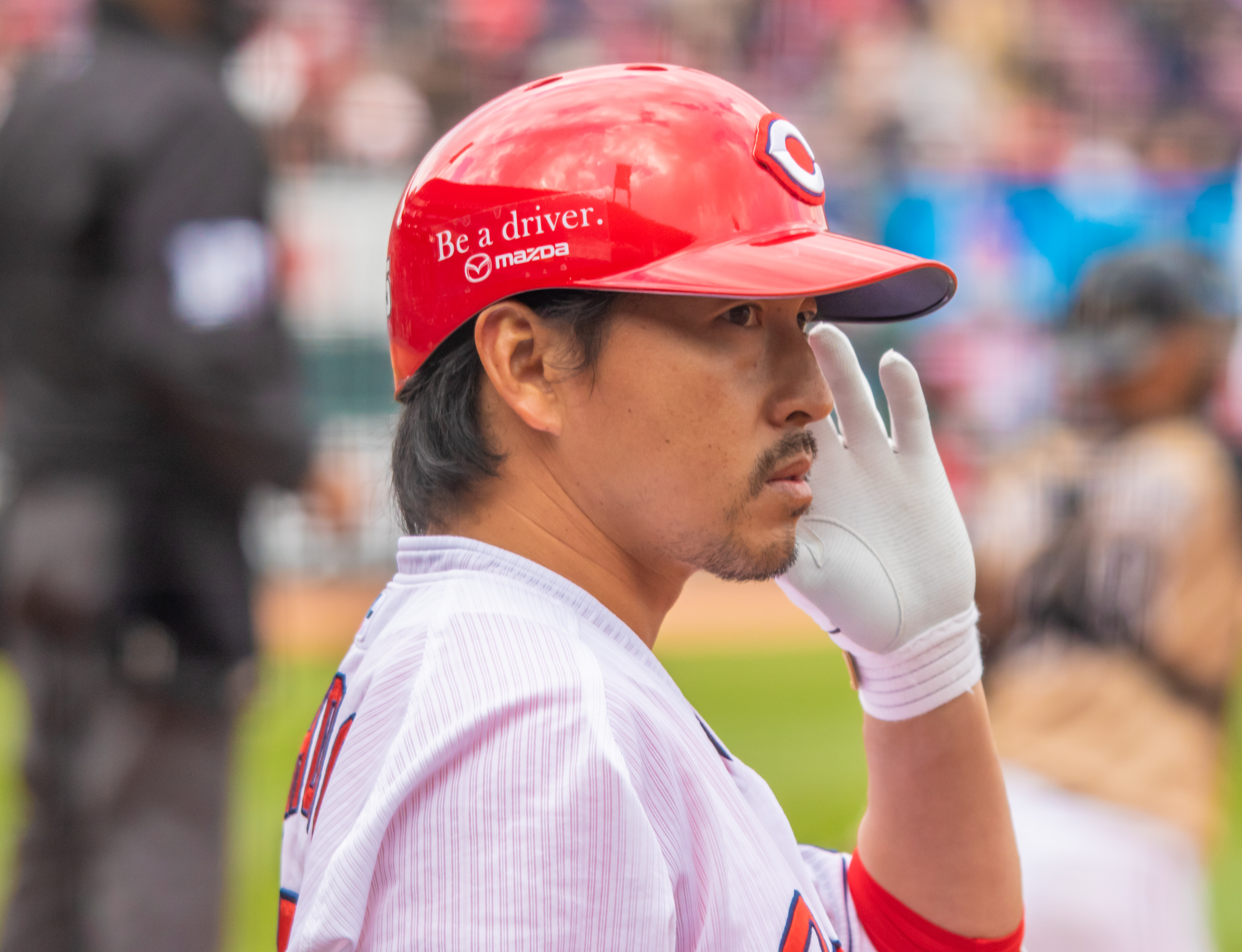 2019年3月12日マツダスタジアム